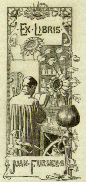 Ex-libris José Passos, 1904